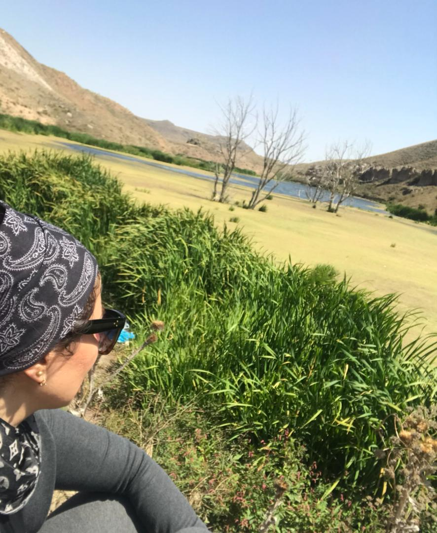 تپه پیرکریم